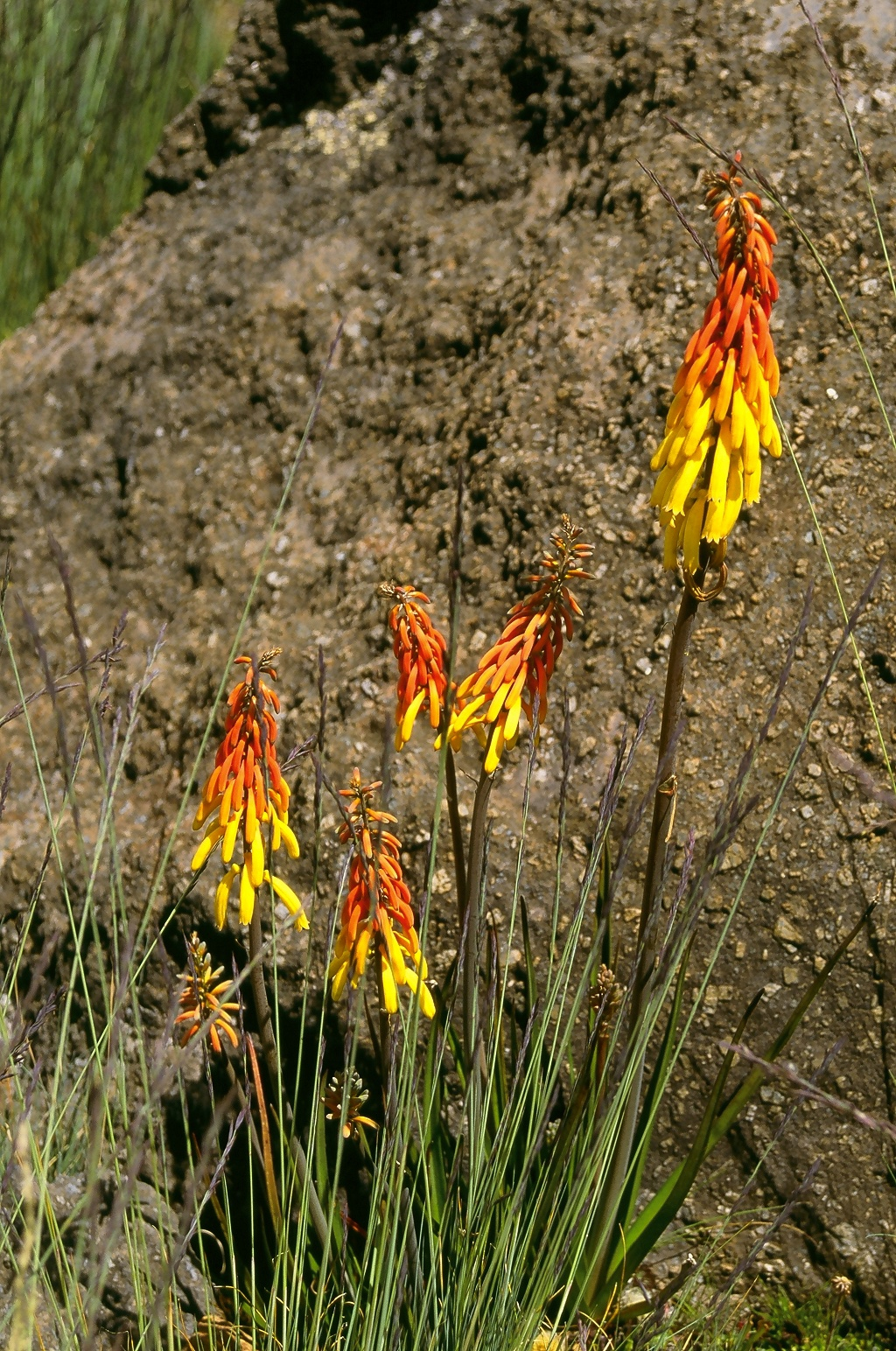 Red hot poker